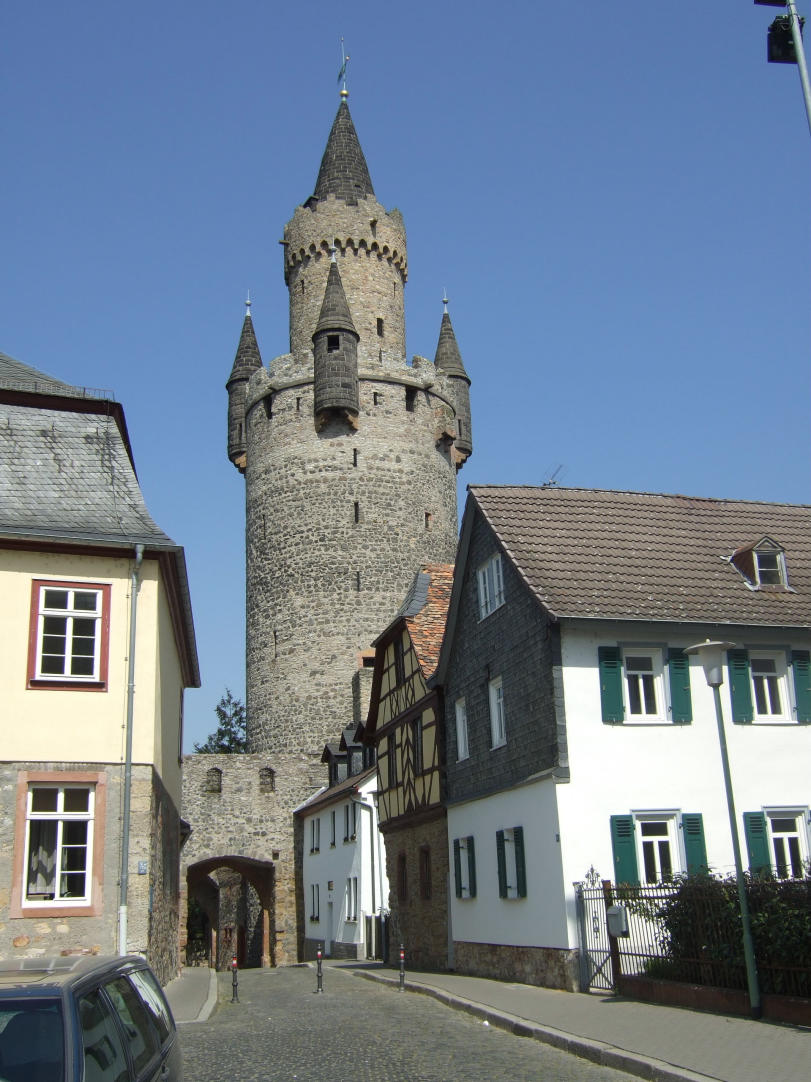 Friedberg Adolfsturm